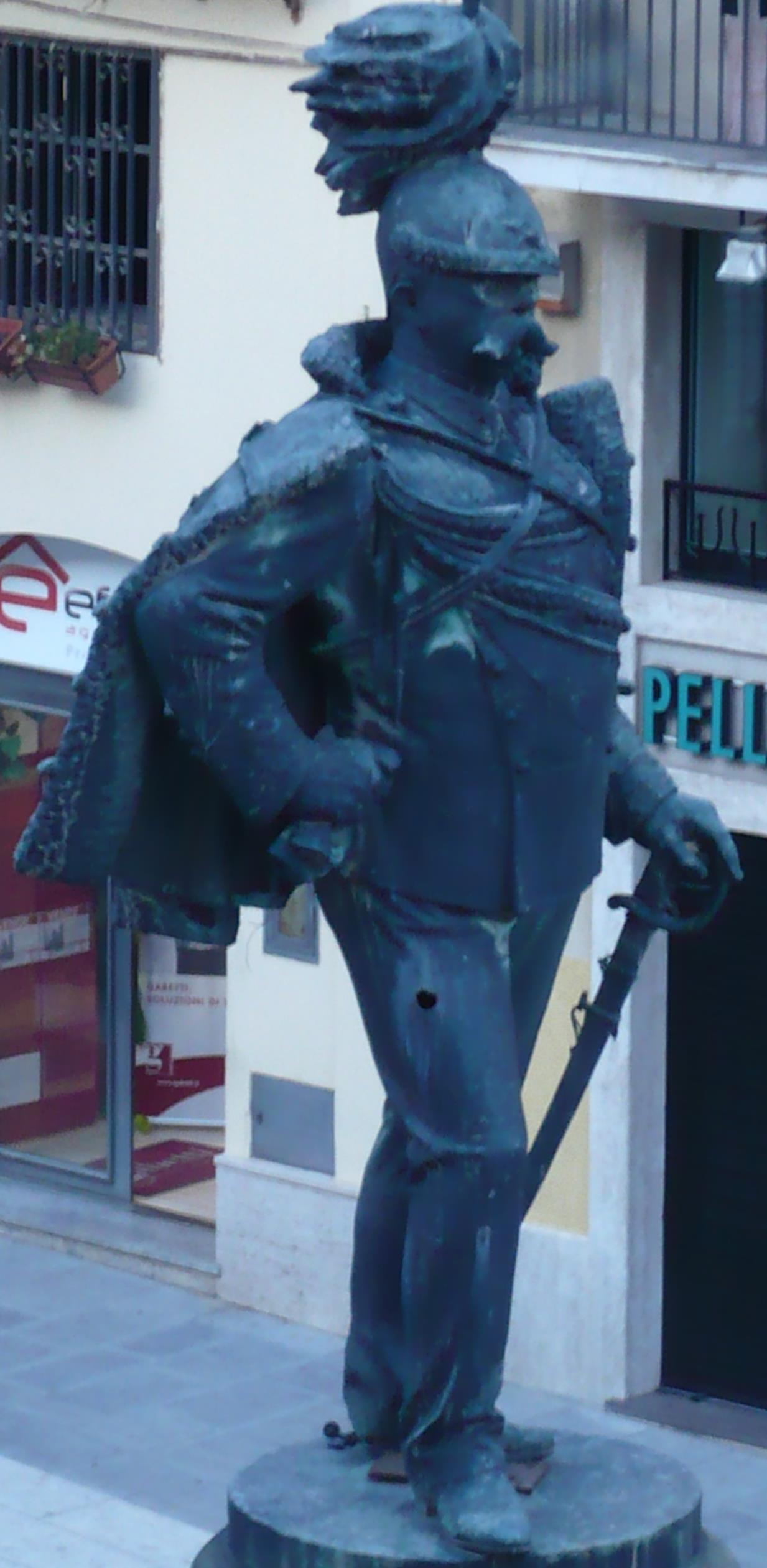 Statua di Umberto I vista dall'alto